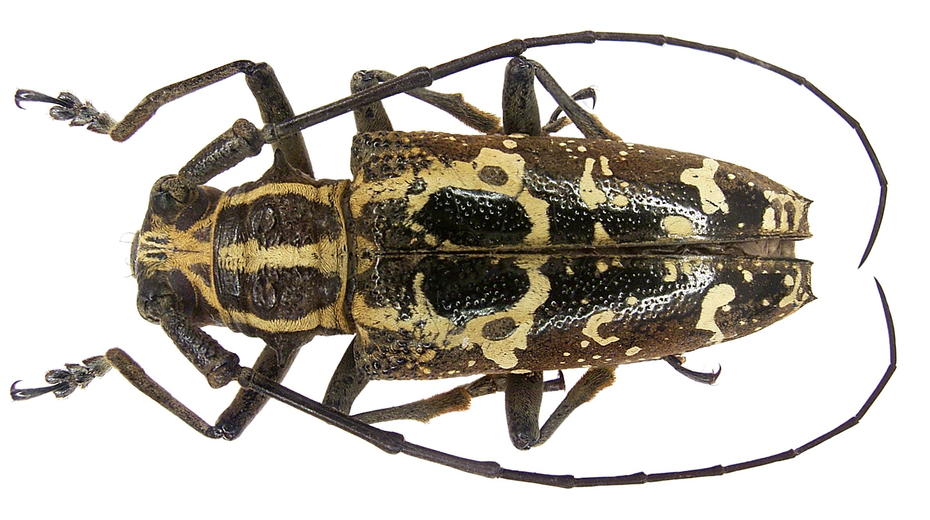 Familie: Cerambycidae Grösse: 24,5 mm Fundort: Philippinen, Leyte, Balocane leg. 2006; det. A.Weigel Foto: U.Schmidt, 2007